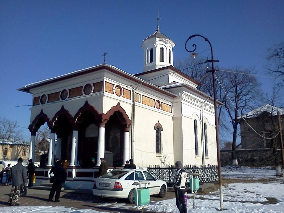 Biserica „Sf. Treime”, „Nașterea Domnului”, cu cripta familiei vornicului Grigore Cantacuzino